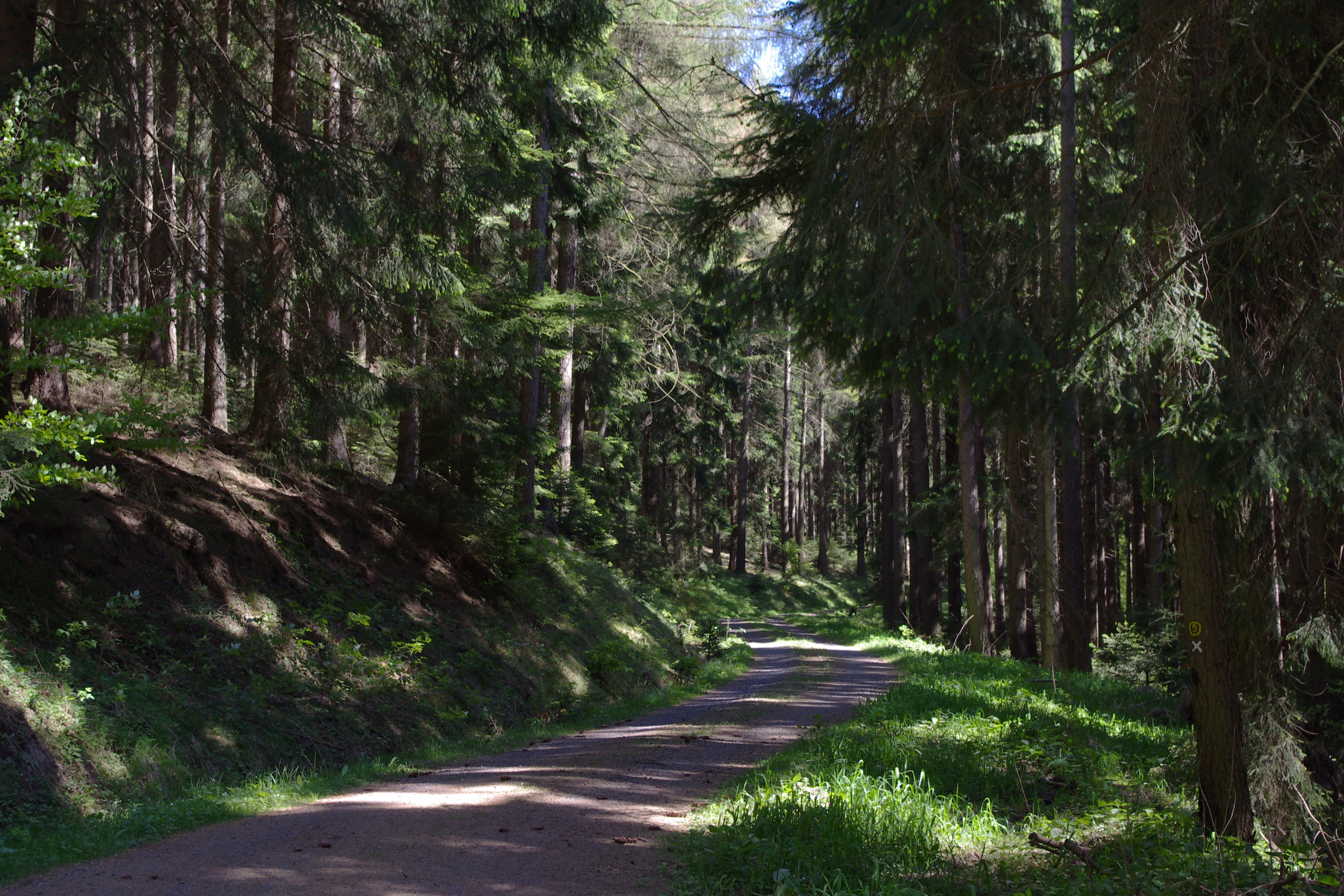 Im Kaufunger Wald, oberes Niestetal